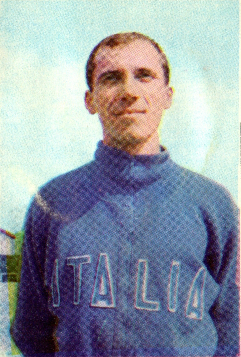 Francesco Bianchi nel 1967